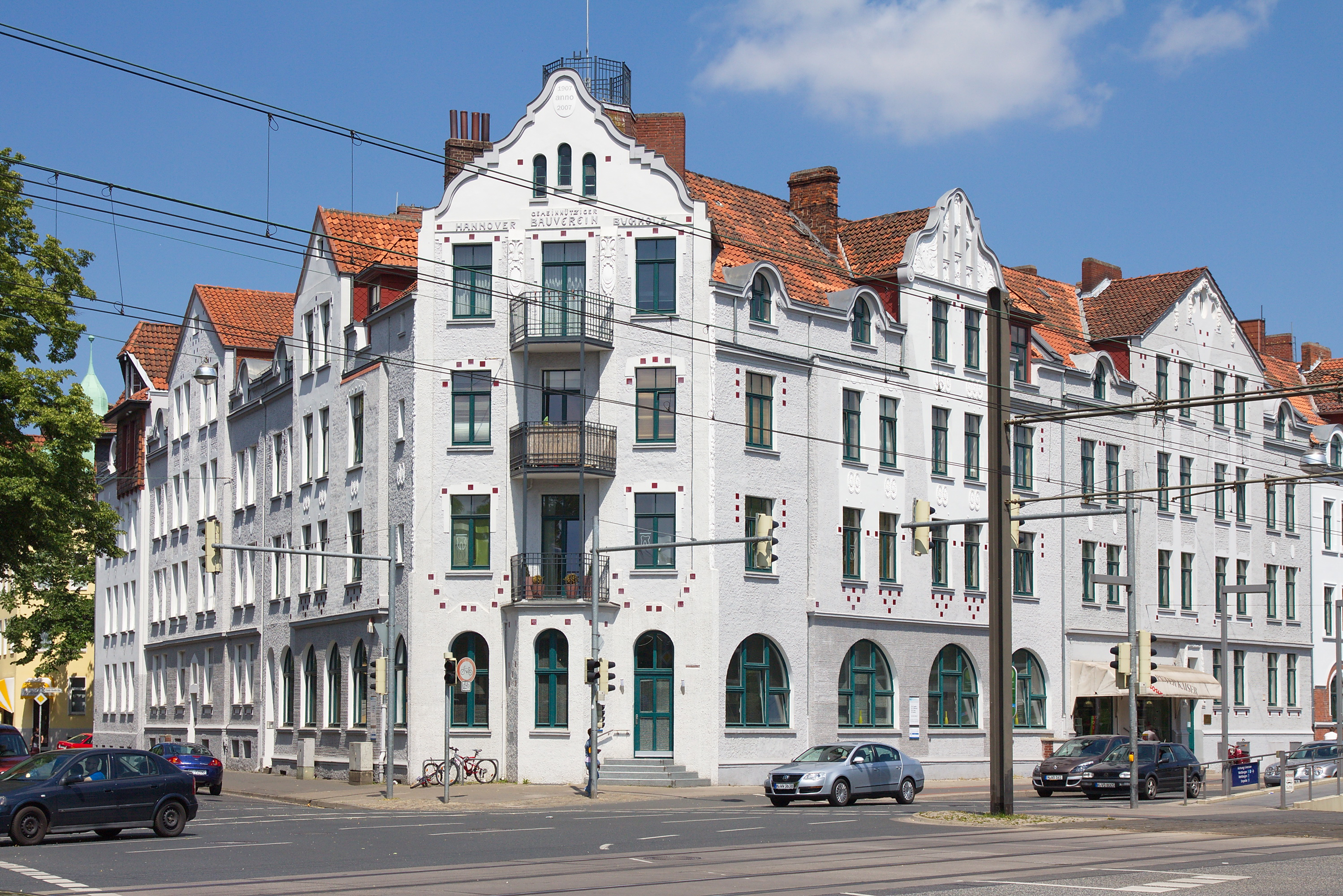 Spannhagenstraße-Podbielskistraße (Hannover), Niedersachsen, Deutschland.